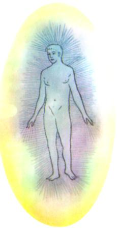 Рисунок ауры здорового человека, согласно книге Ледбитера